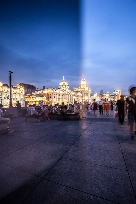 左GND 右无